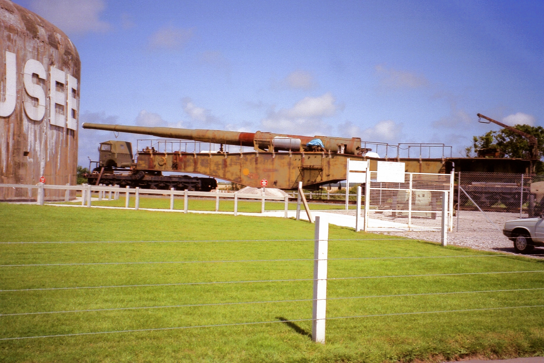 280-mm-Eisenbahngeschütz K 5 E Audinghen 01.08.93